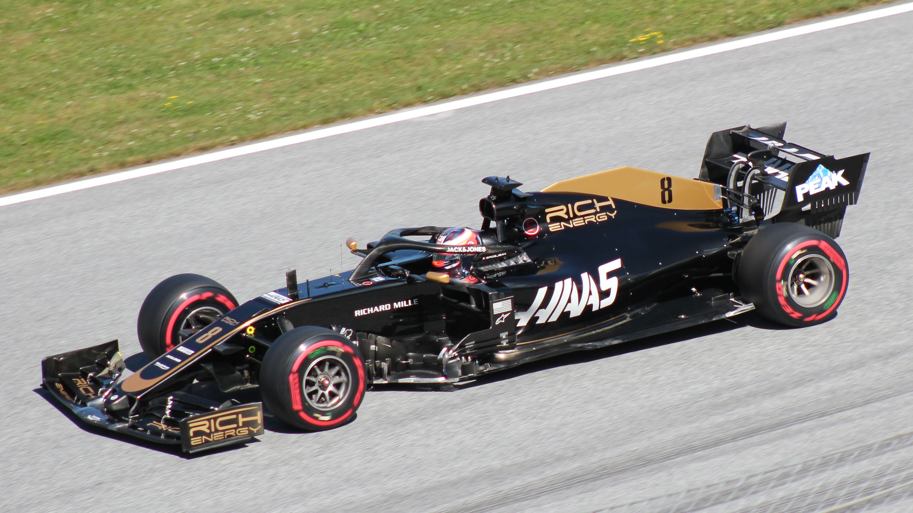 Grosjean beim Rennwochenende in Österreich 2019